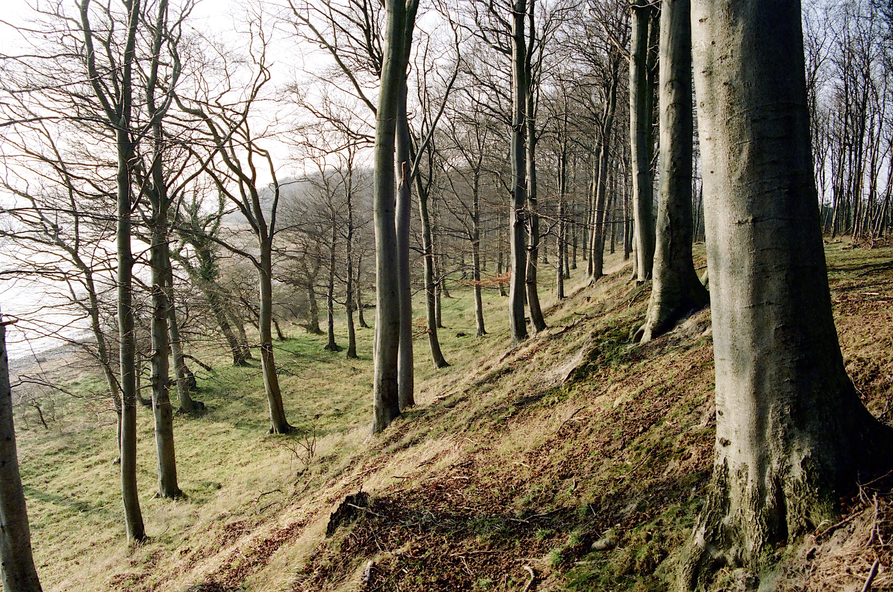 Littorinaskrænt med foranliggende marint forland